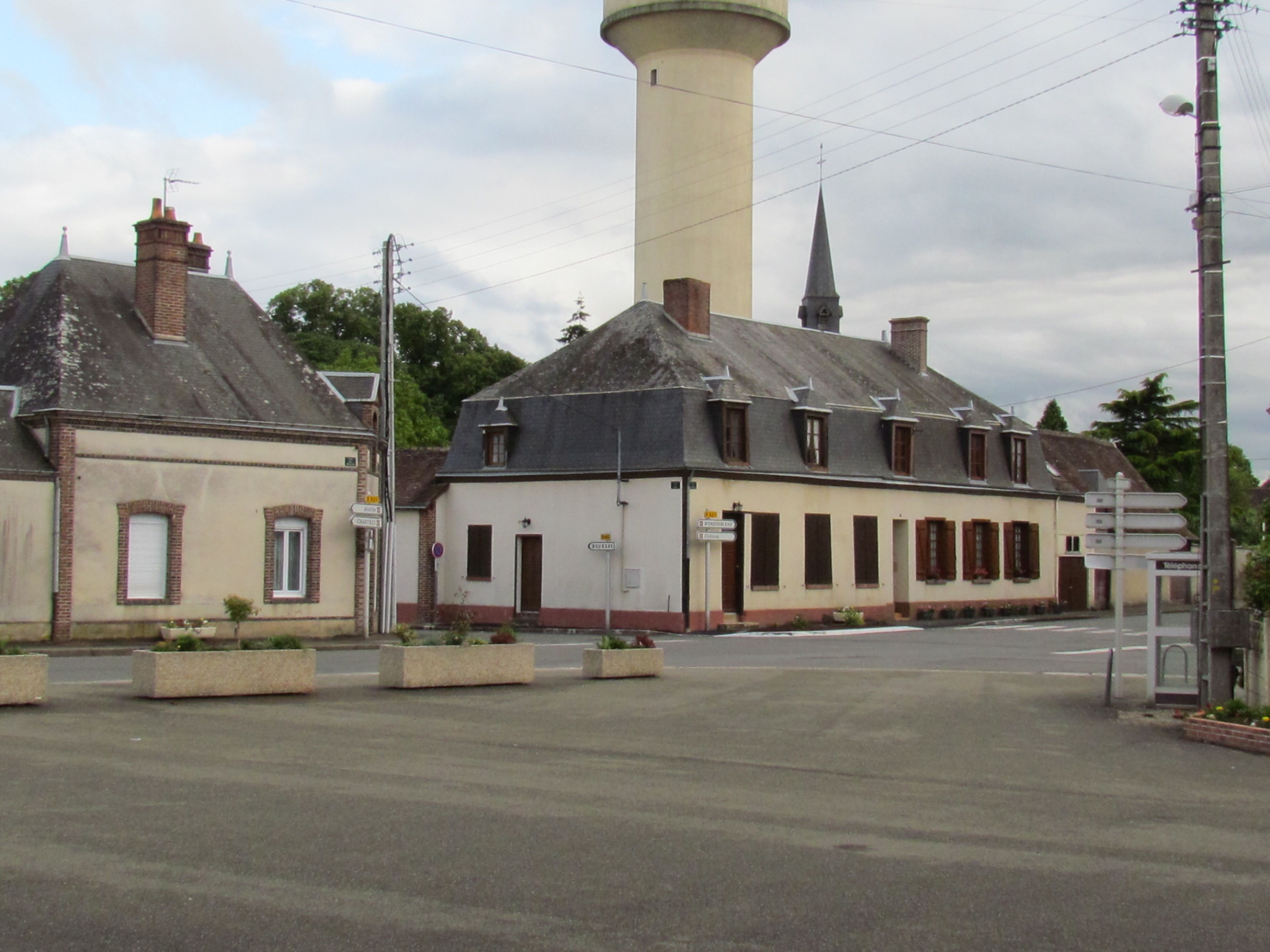 Photographie du centre-bourg depuis la Place de la Pompe.